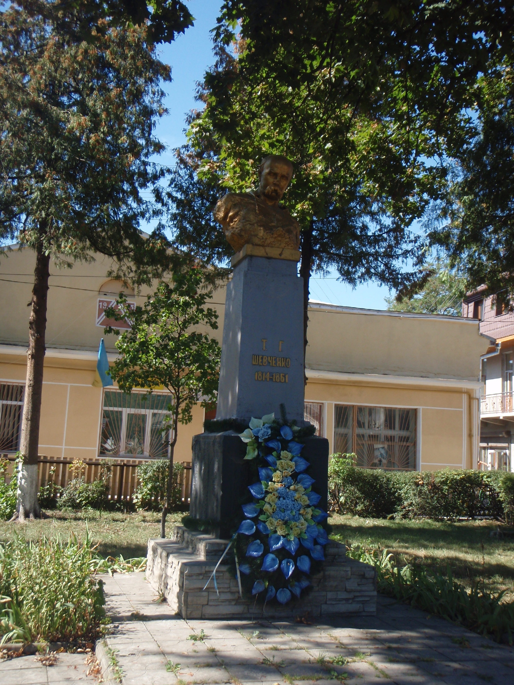 Кути, пам'ятник Тарасу Шевченку